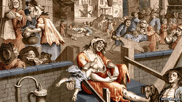 ლუდის ქუჩა და ჯინის ბილიკი